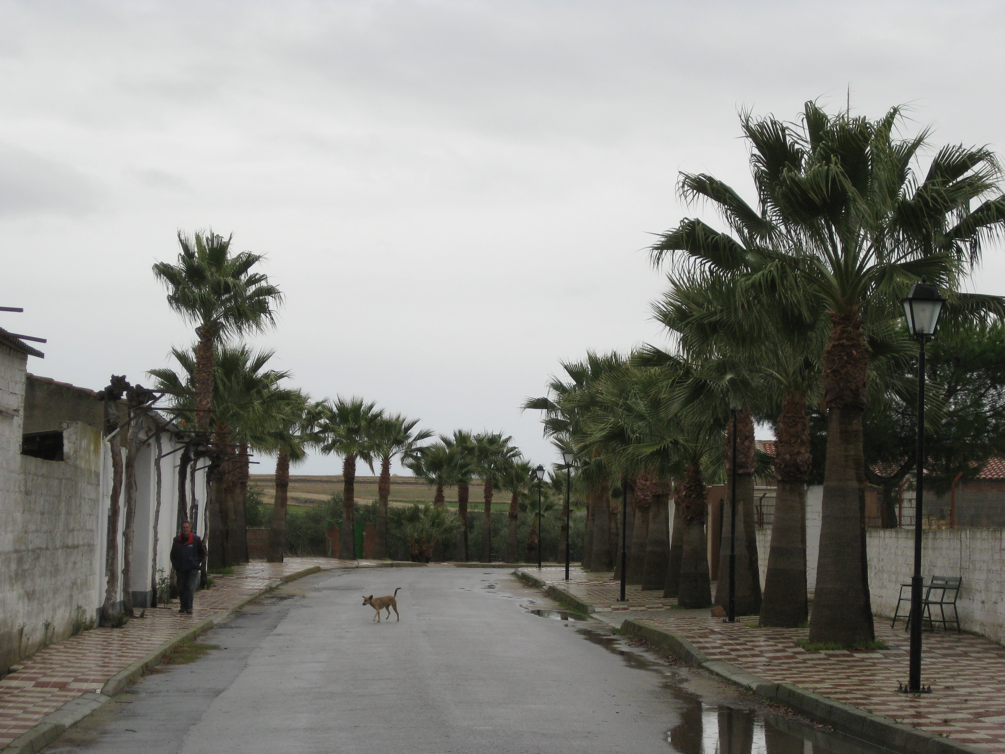 Paseo calle Federico García Lorca